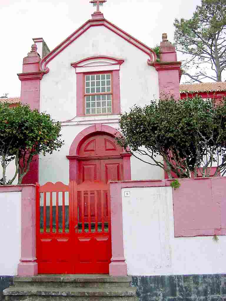 Quinta do Rosário, capela, ilha Terceira, Açores